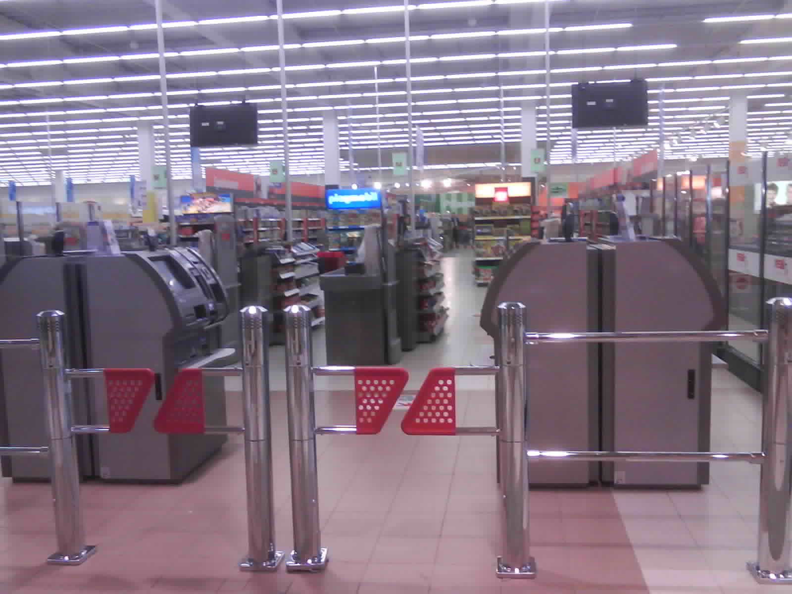 Die SB-Kassen im Real Future Store